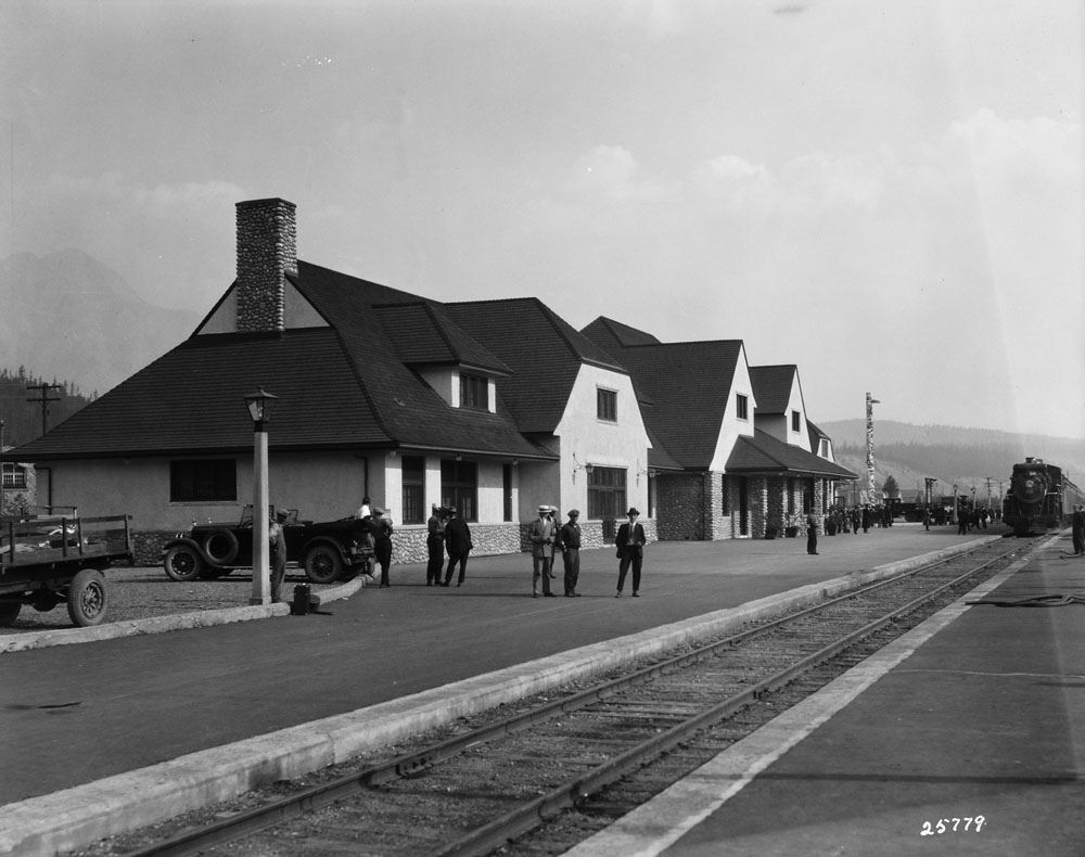 Title / Titre : Canadian National Railways (CNR) totem pole description no. 2, Jasper Lodge / Mât totémique à une gare de la société Canadian National Railways, Jasper Lodge Creator(s) / Créateur(s) : Unknown / Inconnu Date(s) : 1926 Reference No. / Numéro de référence : MIKAN 3519562 Location / Lieu : Jasper, Alberta, Canada Credit / Mention de source : Canadian National Railways. Library and Archives Canada, e010860580 / Chemin de fer national canadien. Bibliothèque et Archives Canada, e010860580